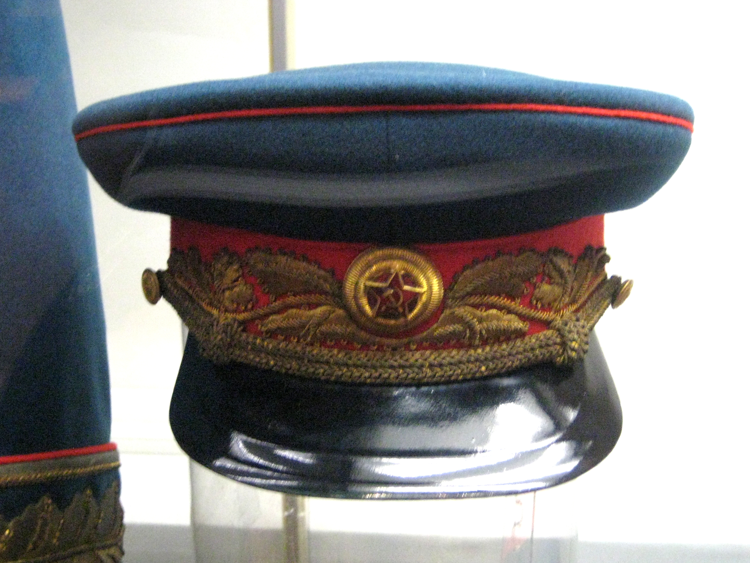 Фуражка к мундиру маршала Советского Союза. Из личных вещей И.В. Сталина. СССР, 1945. ГИМ